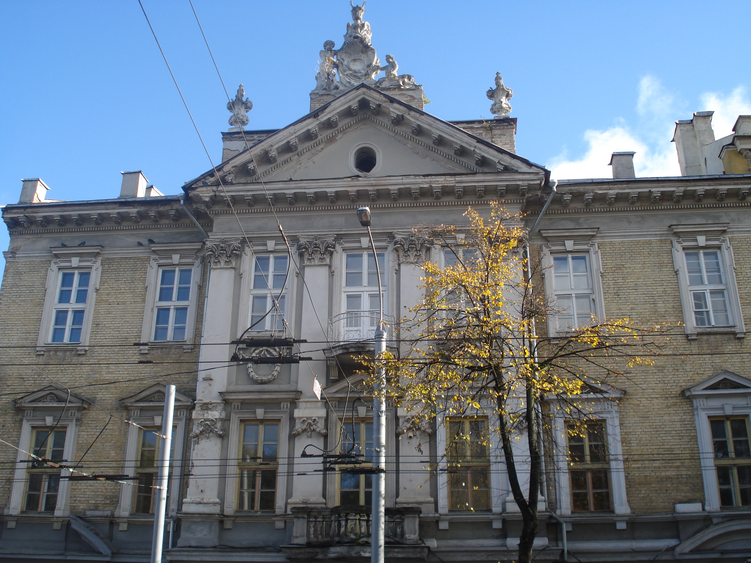 Частный дом на Завальной (Еврейский музей, Пилимо 4) Pylimo g. 4 The Vilna Gaon Lithuanian State Jewish Museum. Architect Tadeusz Maria Rostworowski